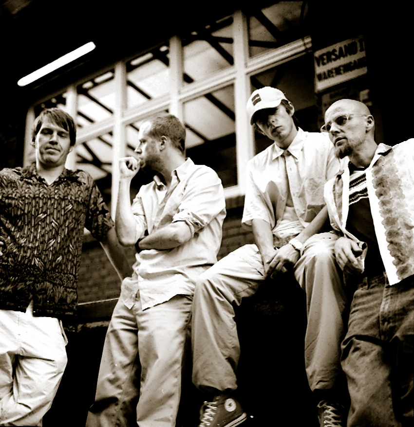 Fanta 4 in Stuttgart backstage